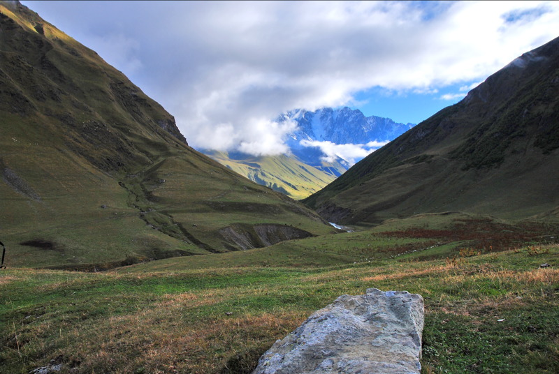 נפת מסטיה